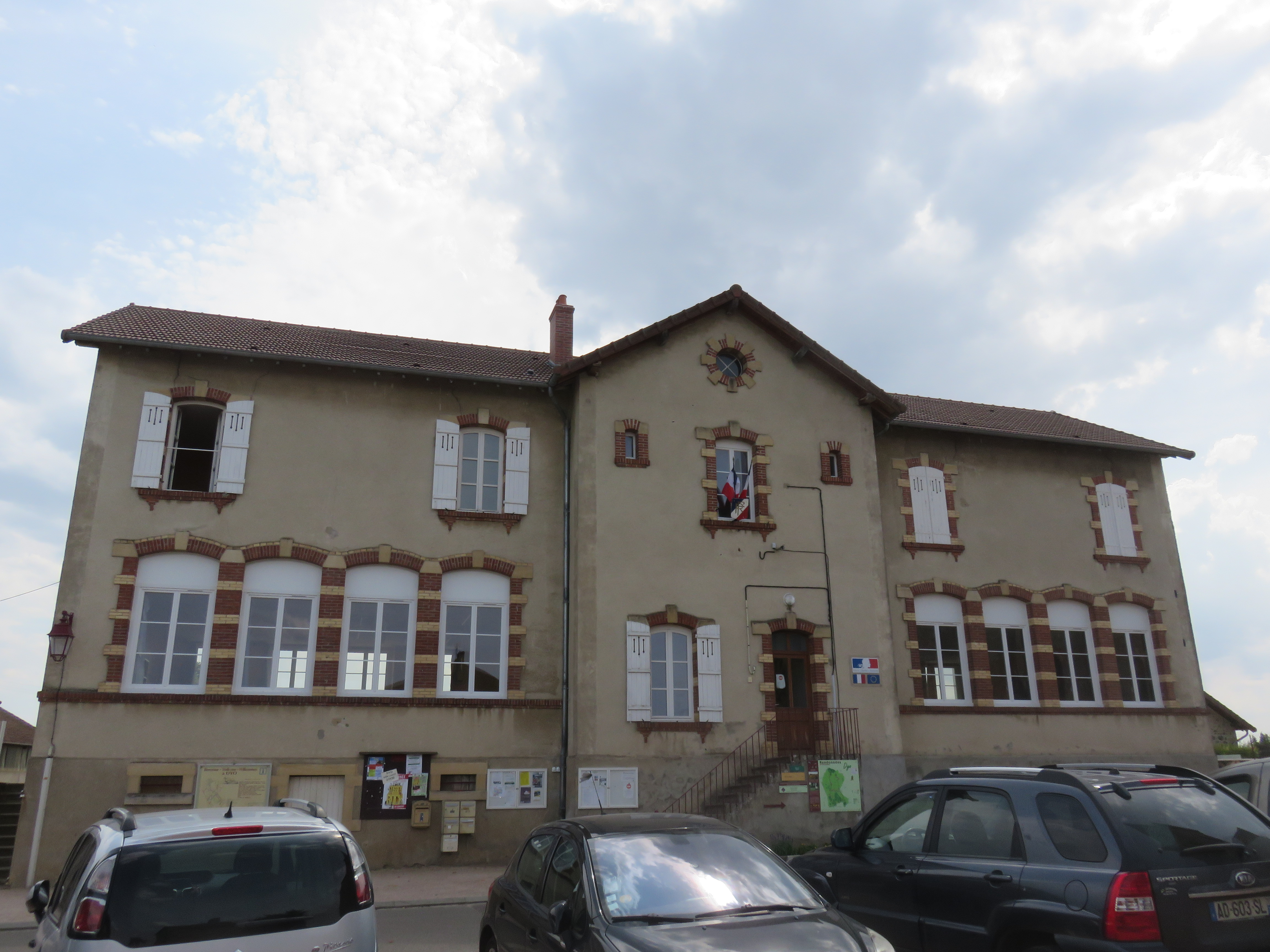 Mairie de Dyo (Saône-et-Loire, France).